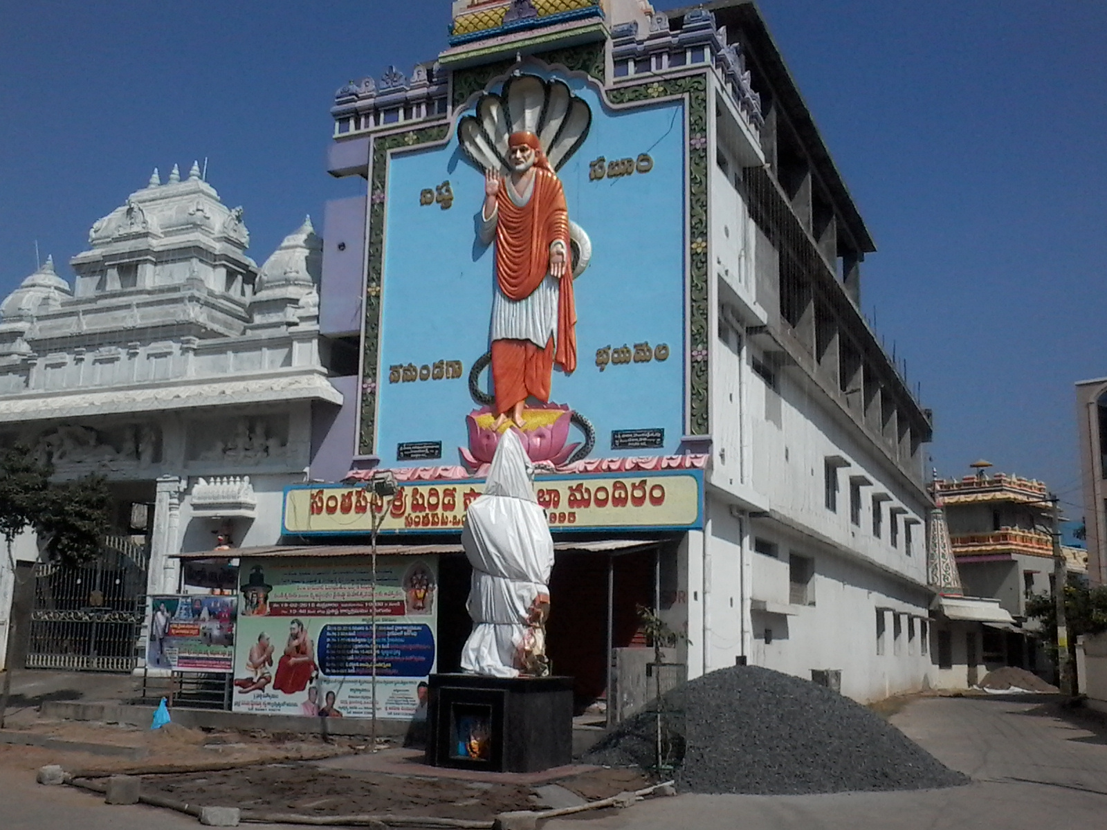 సాయిబాబ మందిరం, ఒంగోలు